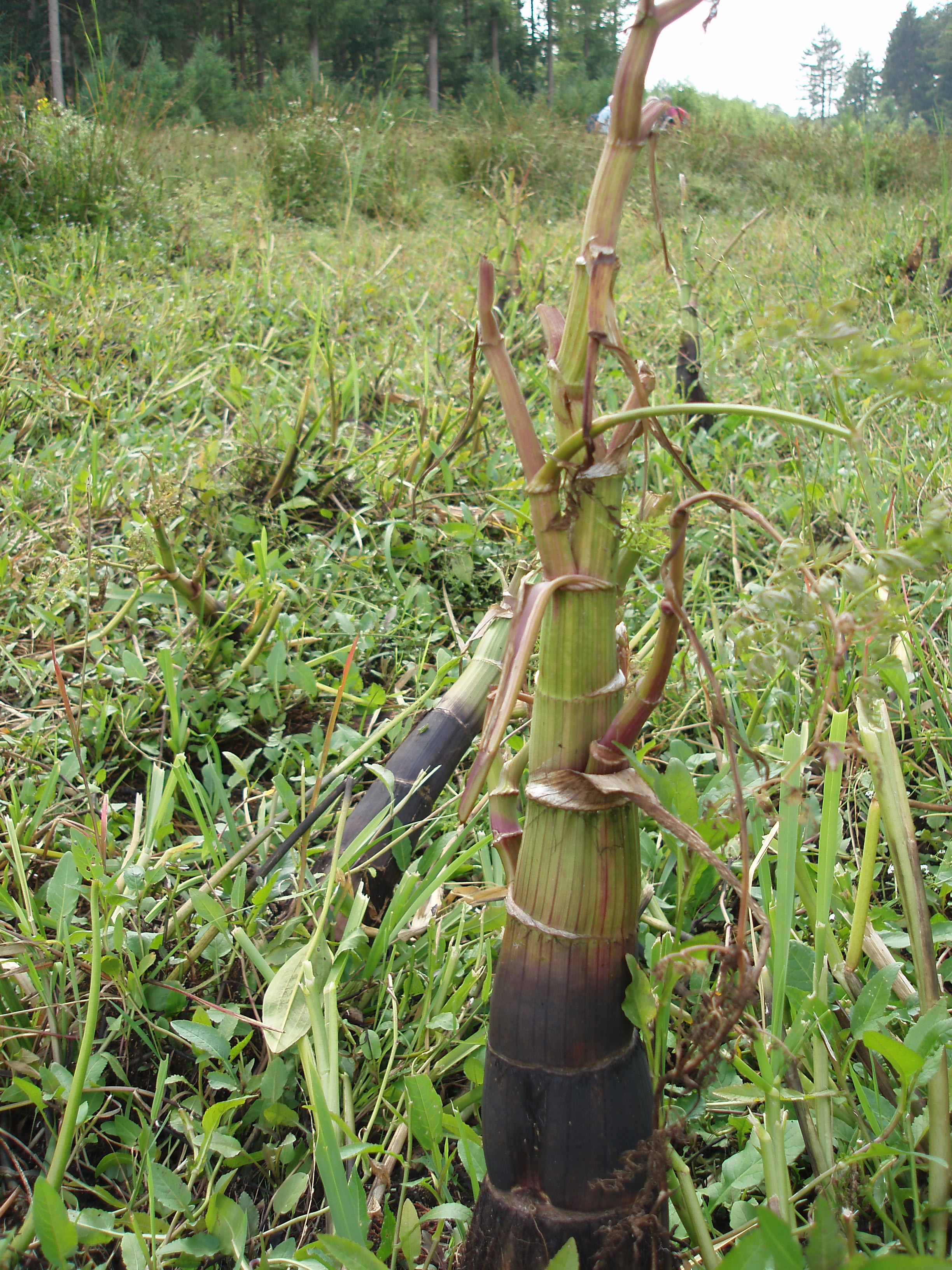 Watertorkruid (Oenanthe aquatica), Drents-Friese Wold